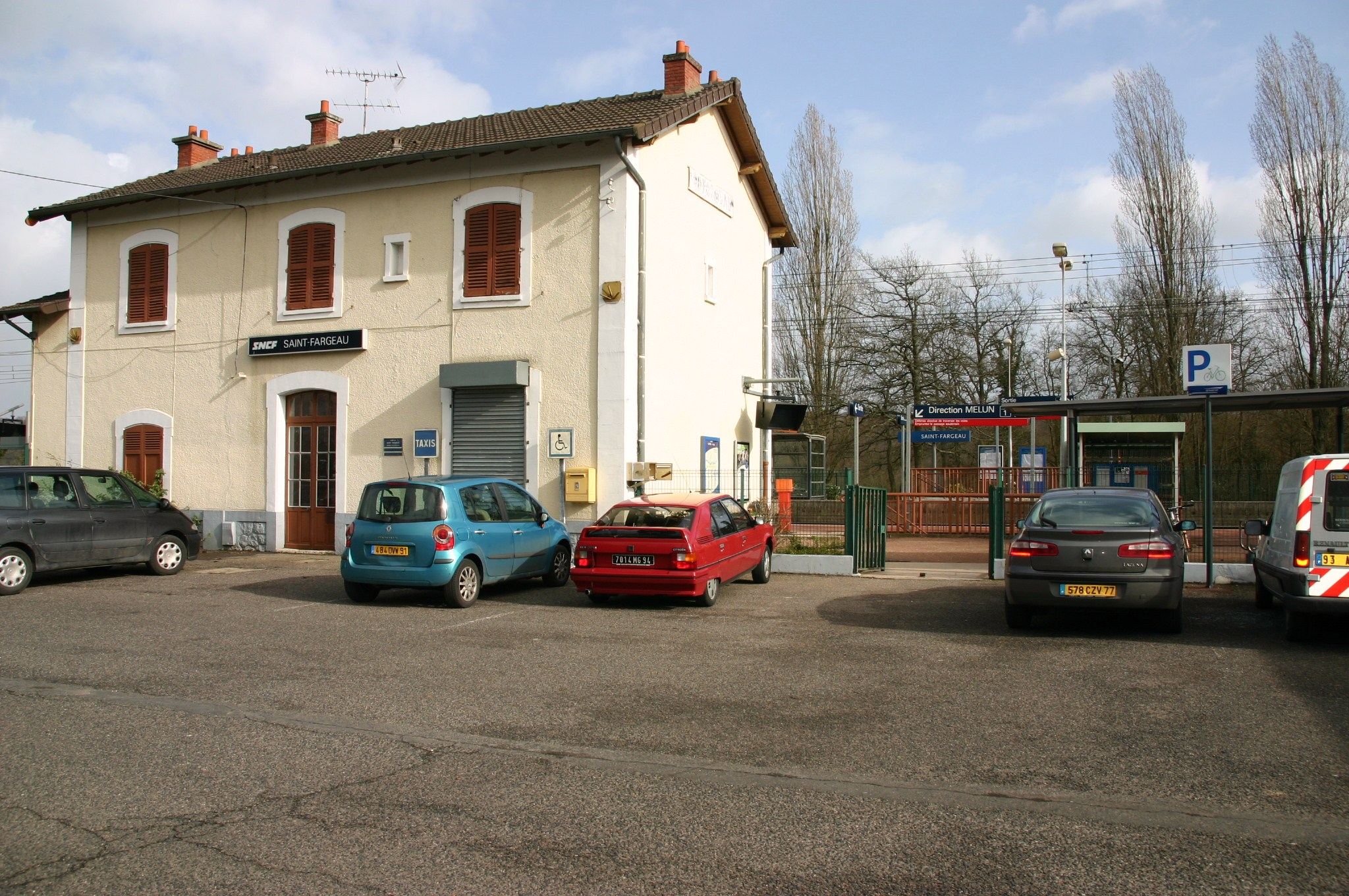 La gare de Saint-Fargeau, Saint-Fargeau-Ponthierry, département de la Seine-et-Marne (France)